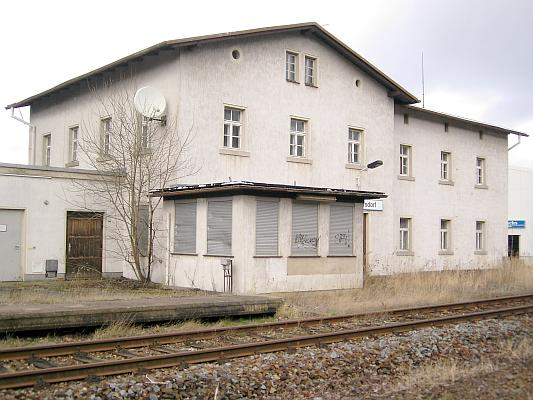 nádraží v Dürrhennersdorfu